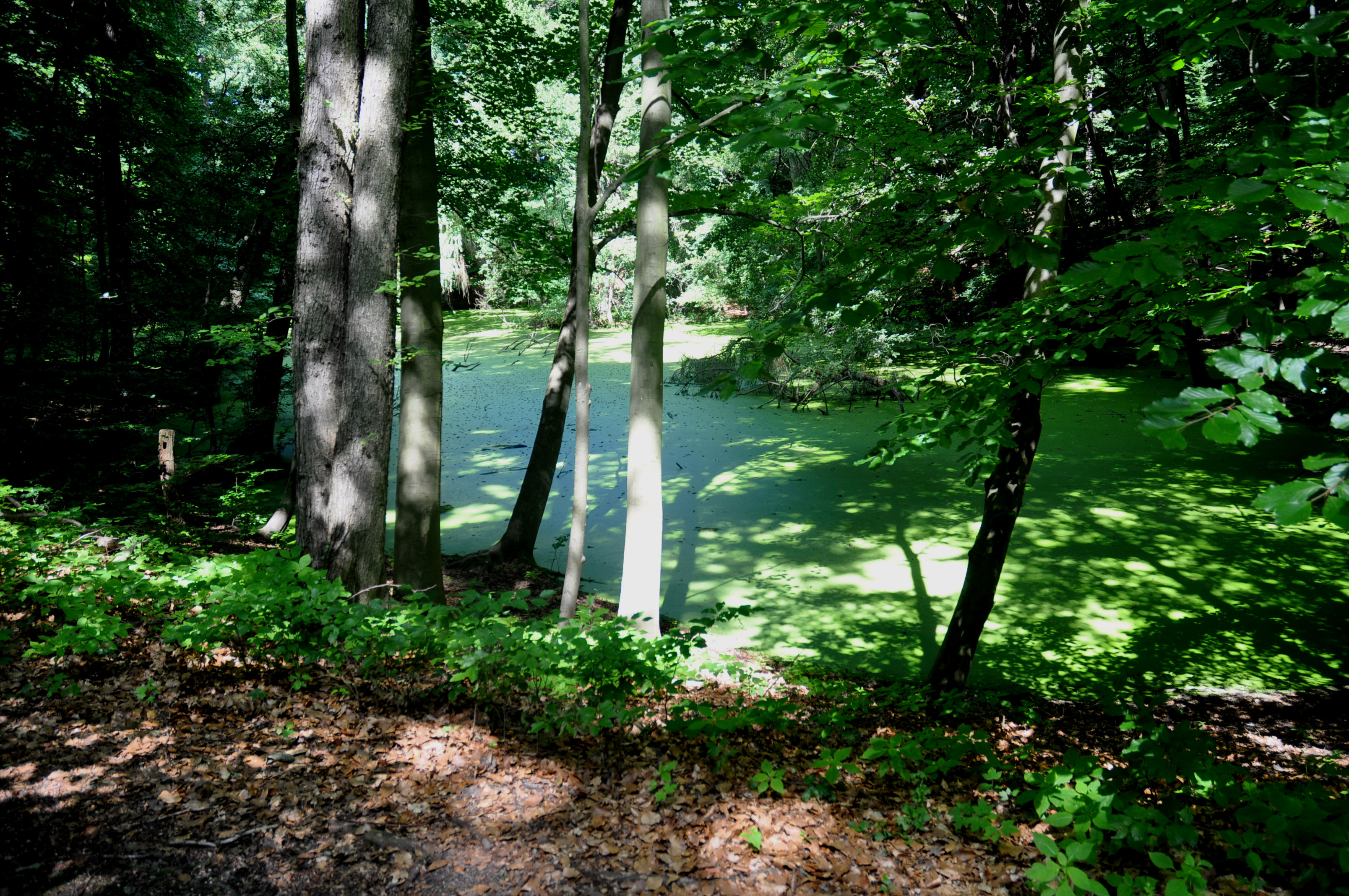 Der Hirtenteich von Süden